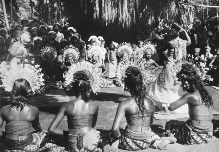 Foto. Janger dans